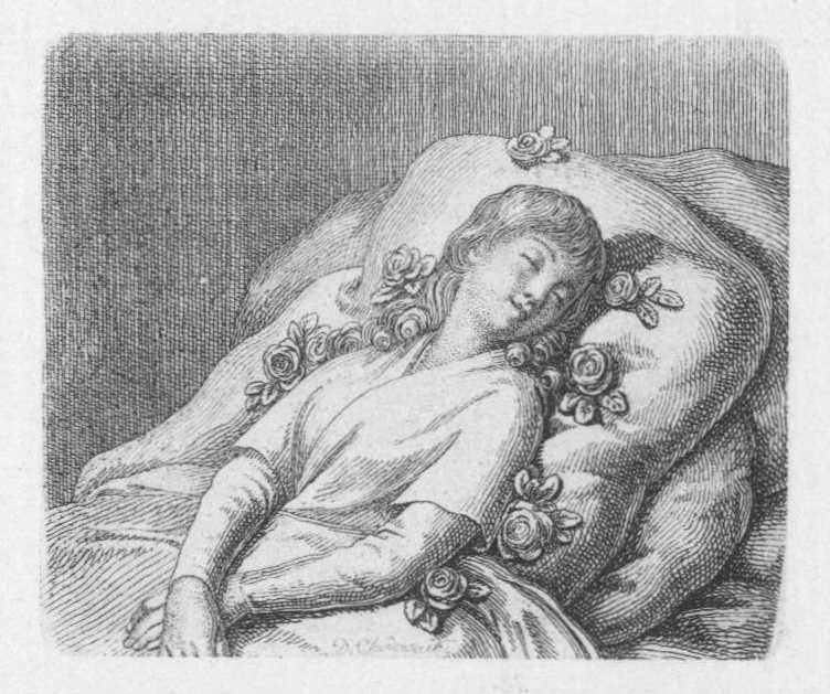 Die auf Rosen schlummernde Unschuld. (Beschreibung lt. Quelle)